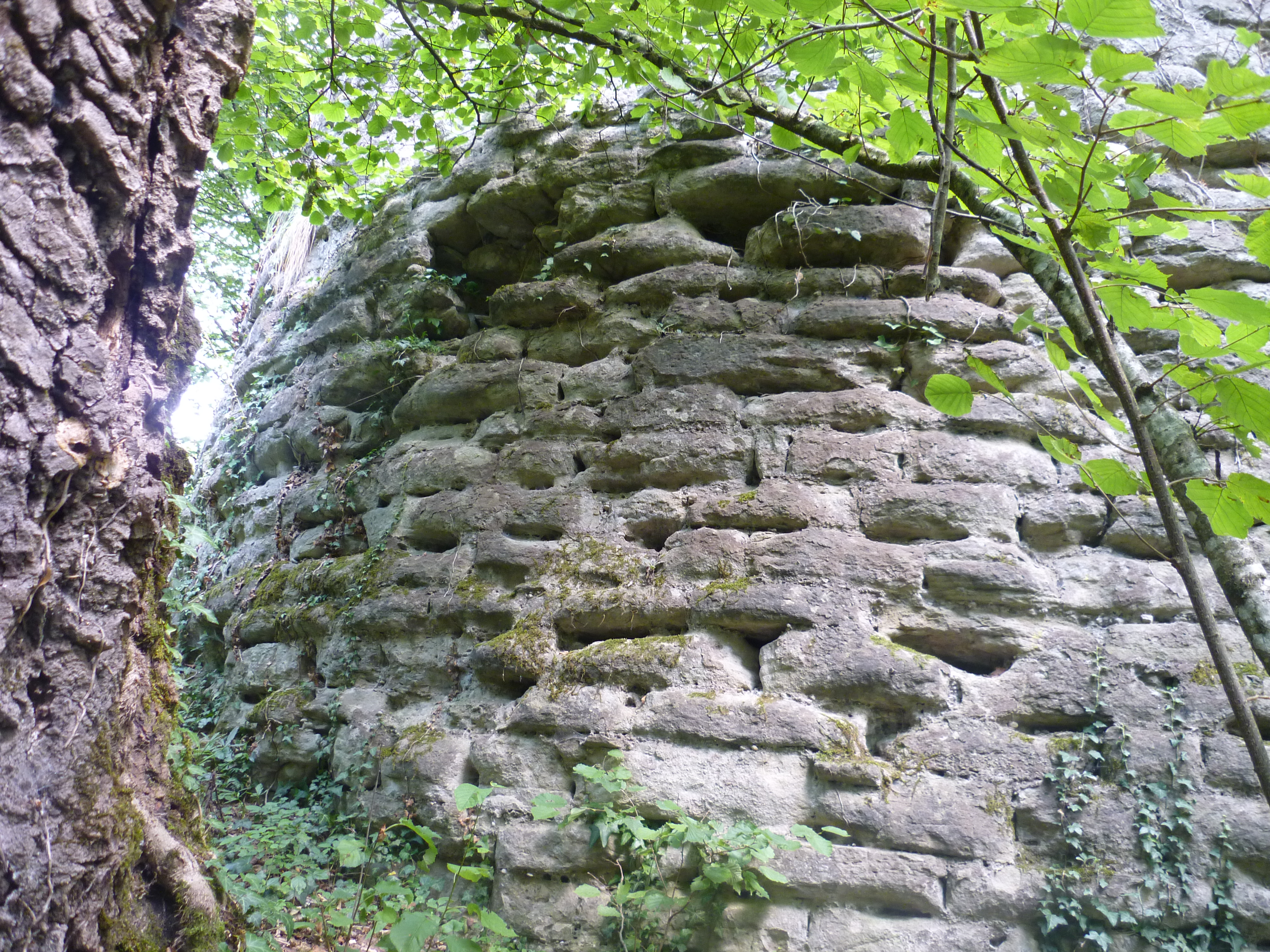 Ruines du château de Crête (XIV° siècle), Versonnex, Haute-Savoie (France)